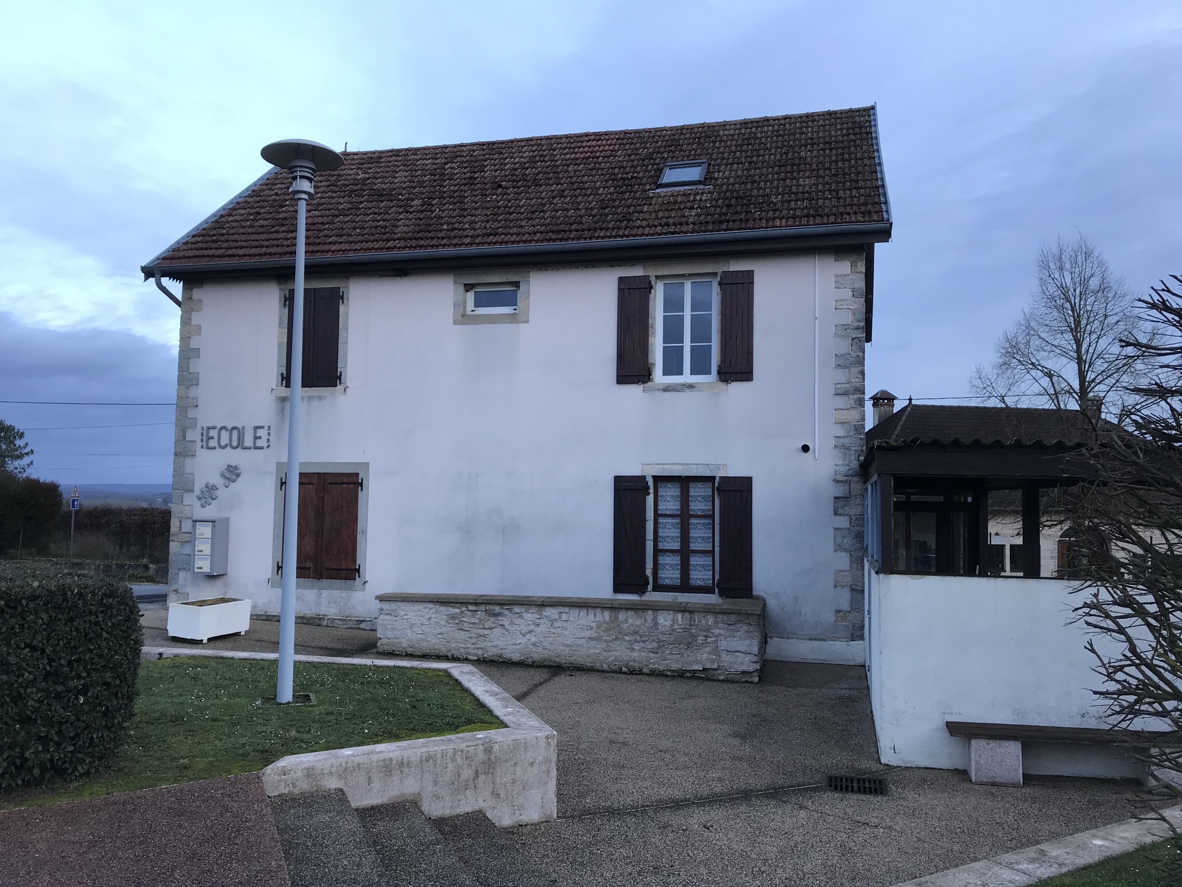 La Barre (Jura) en janvier 2018.